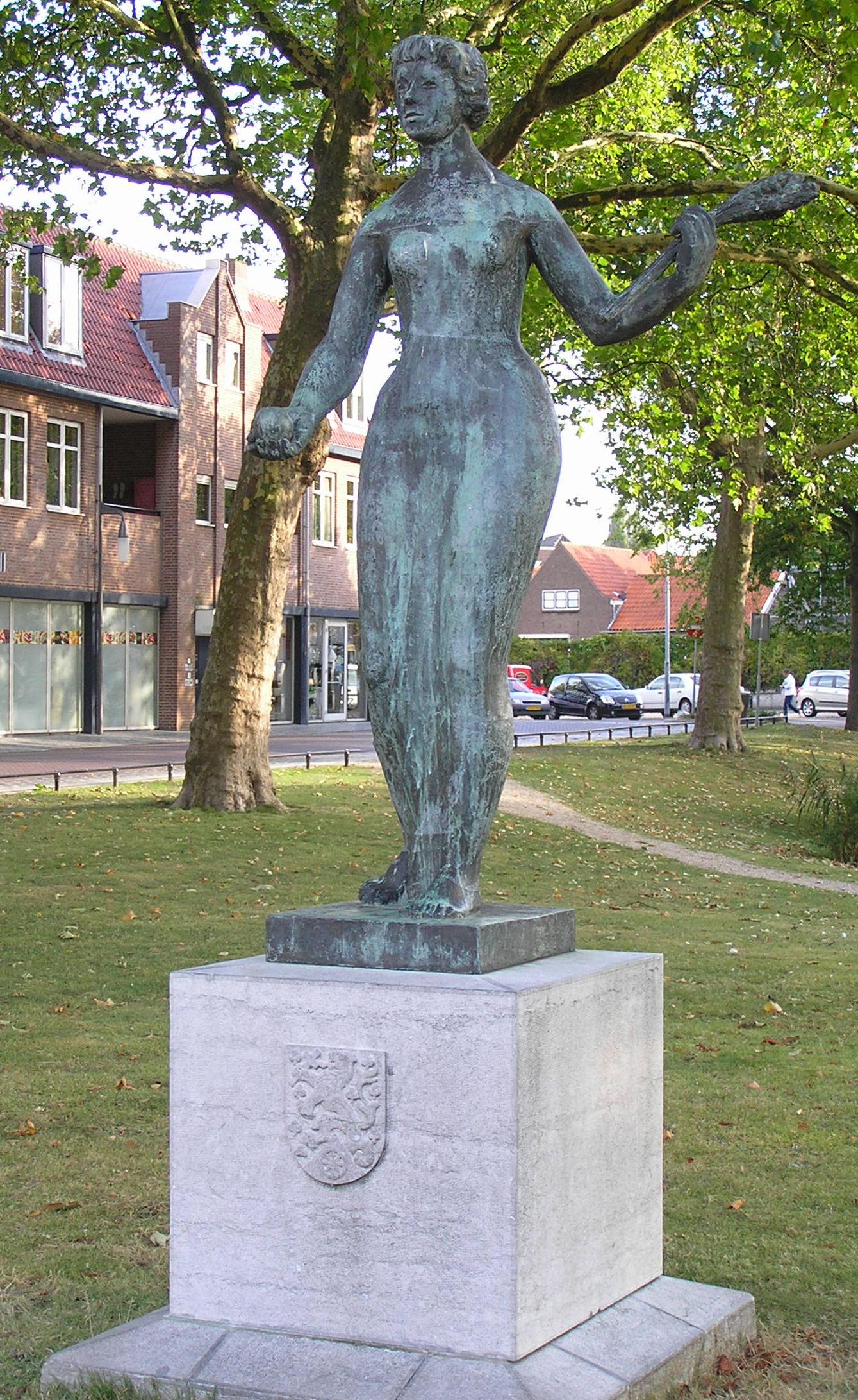 Beeld "Ceres" van Philip ten Klooster aan het Damplein, Goes.